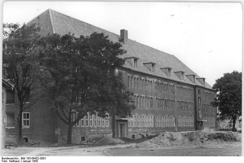 Stralsund, Wohnungsbauprogramm, Goetheschule Keilhaus Mein.Be. 8422-1N Wohnungsbauprogramm in Stralsund. Bei seinem Besuch in der Volkswerft Stralsund am 3.12.1949 erfuhr der Staatspräsident Wilhelm Pieck von den dortigen schlechten Wohnverhältnissen und versprach Abhilfe zu schaffen. Der Erfolg dieser Zusicherung machte sich bald bemerkbar, als ein gewaltiges Wohnungsbauprogramm entwickelt wurde, das bis Dezember 1950 den Bau von ca. 360 Wohnungen versieht. Ein Teil von ihnen ist bereits fertiggestellt und bewohnt. UBz: Die Goetheschule, die innerhalb des Wohnungsbauprogrammes aus einer ehemaligen Kaserne errichtet wurde.